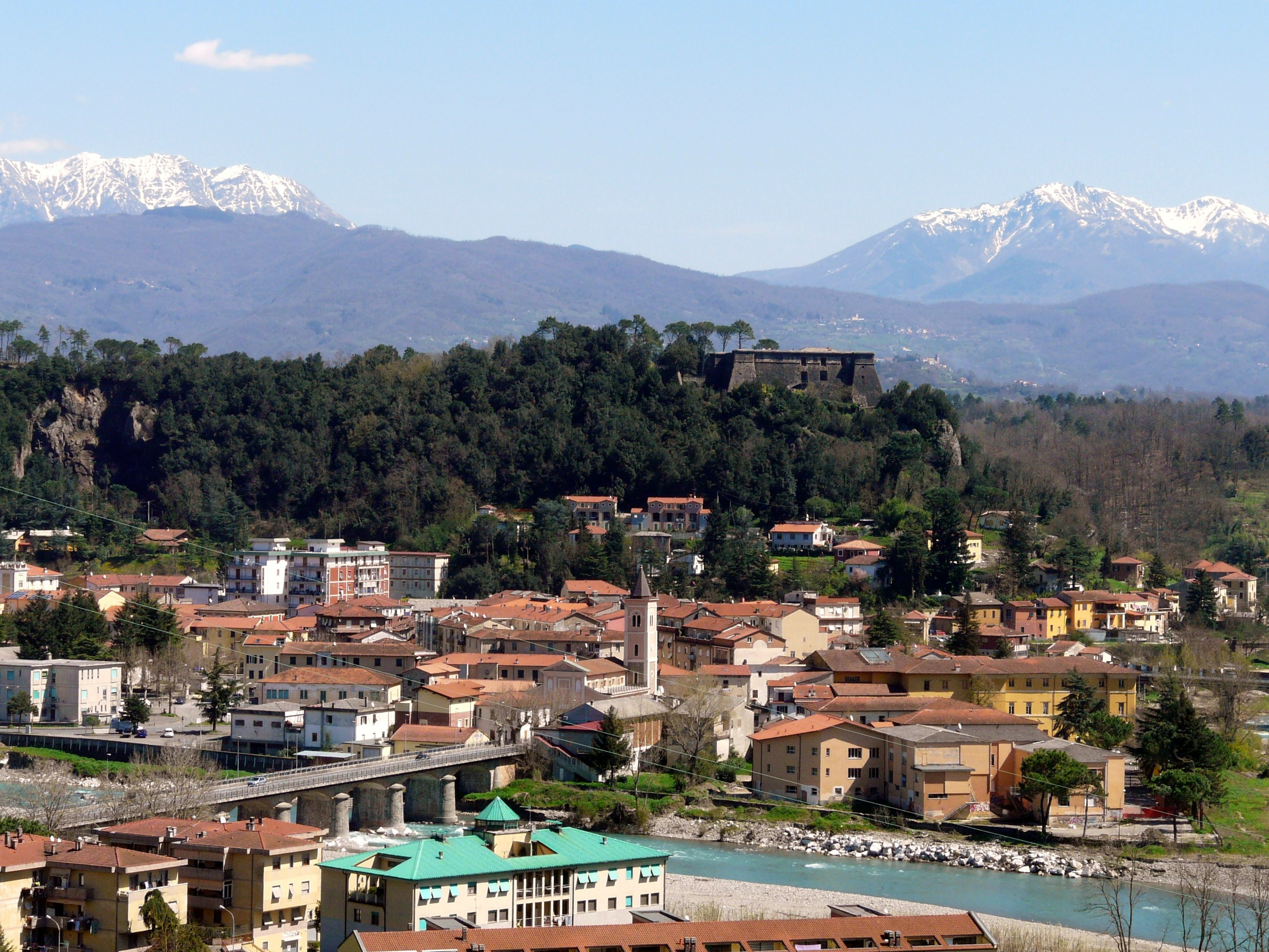 Panorama da Podenzana di Aulla, Toscana, Italia